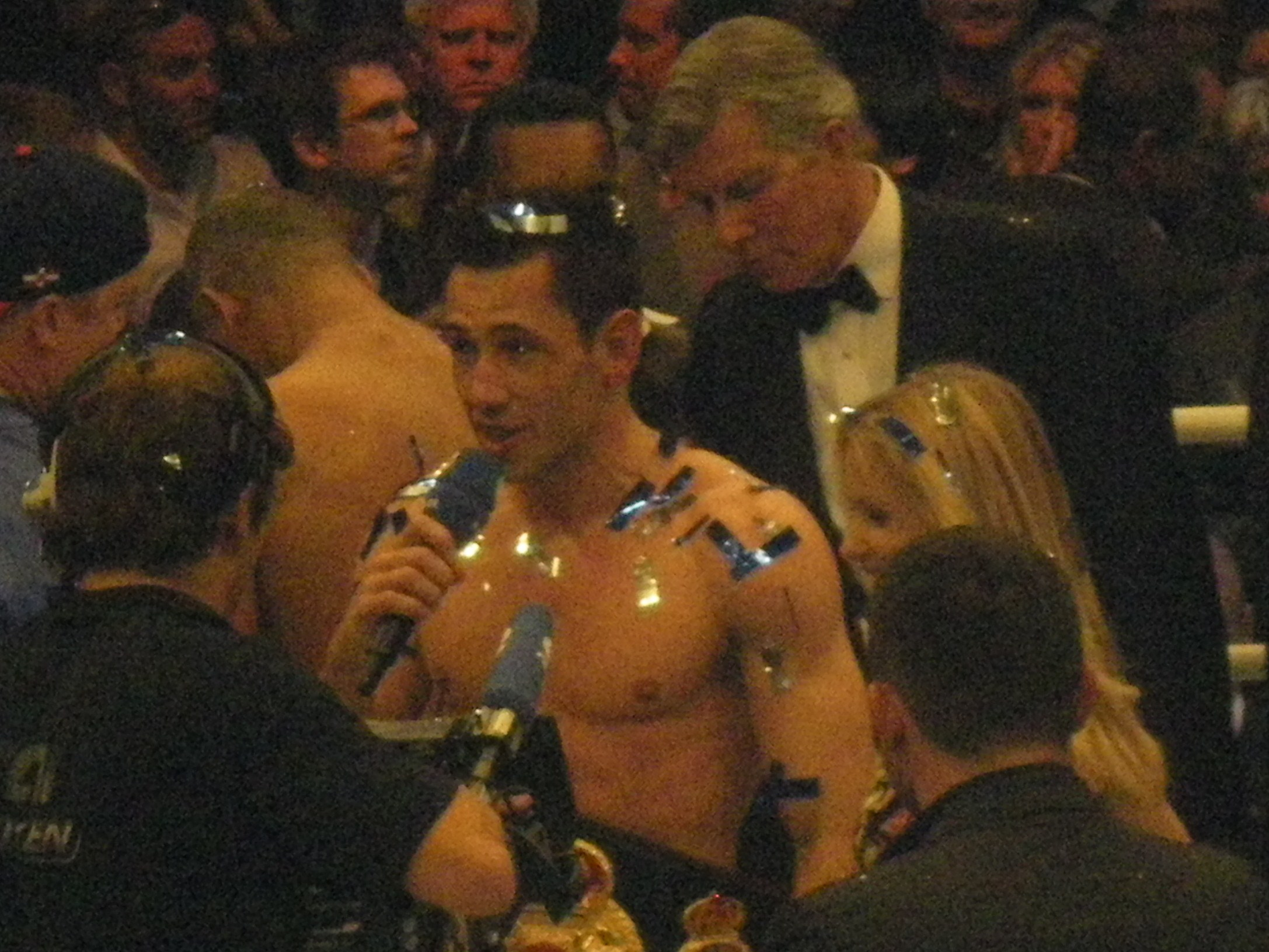 nach dem Kampf gegen Giovanni Lorenzo